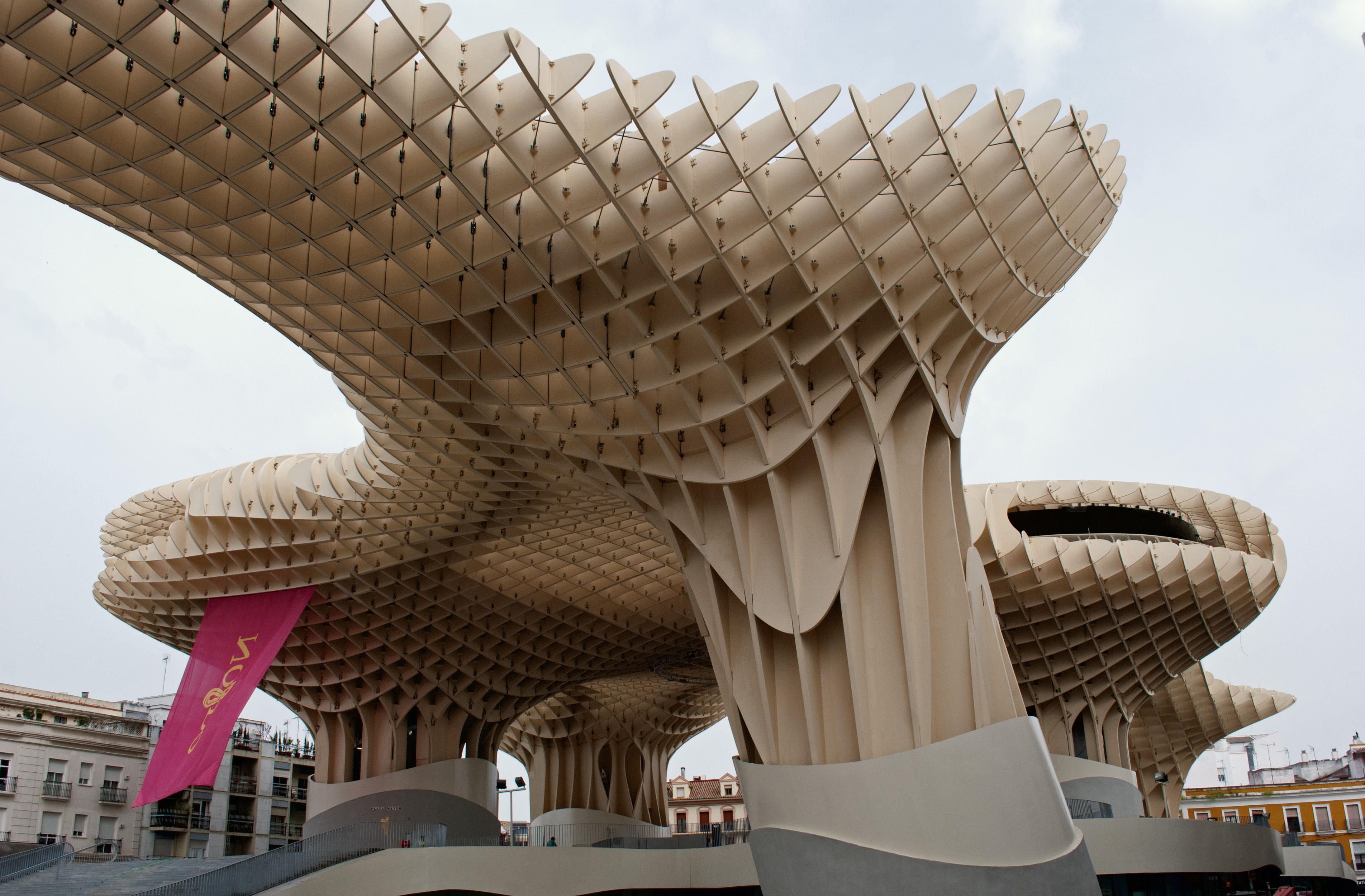 Metropol parasol, el 2 de abril de 2011. Sevilla